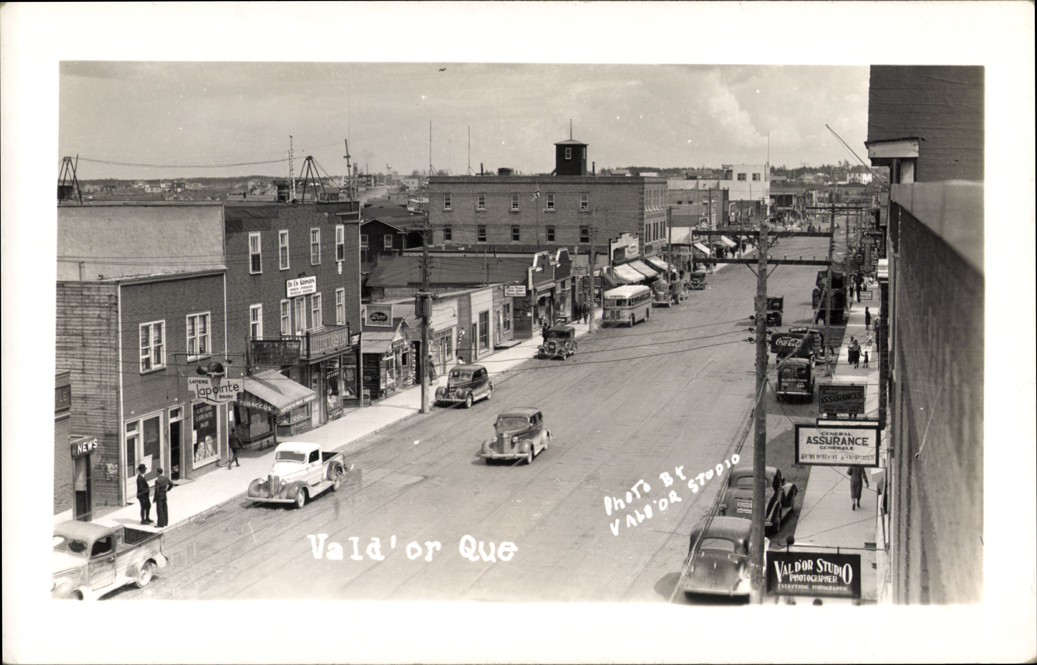 Val d'Or, carte postale, Val d'Or Studio